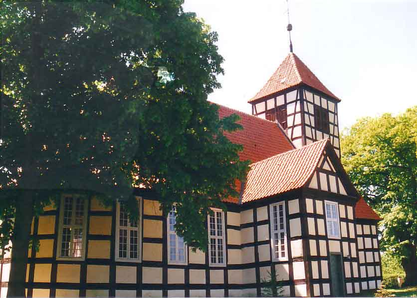 Fachwerkkirche Luckow, Äußeres